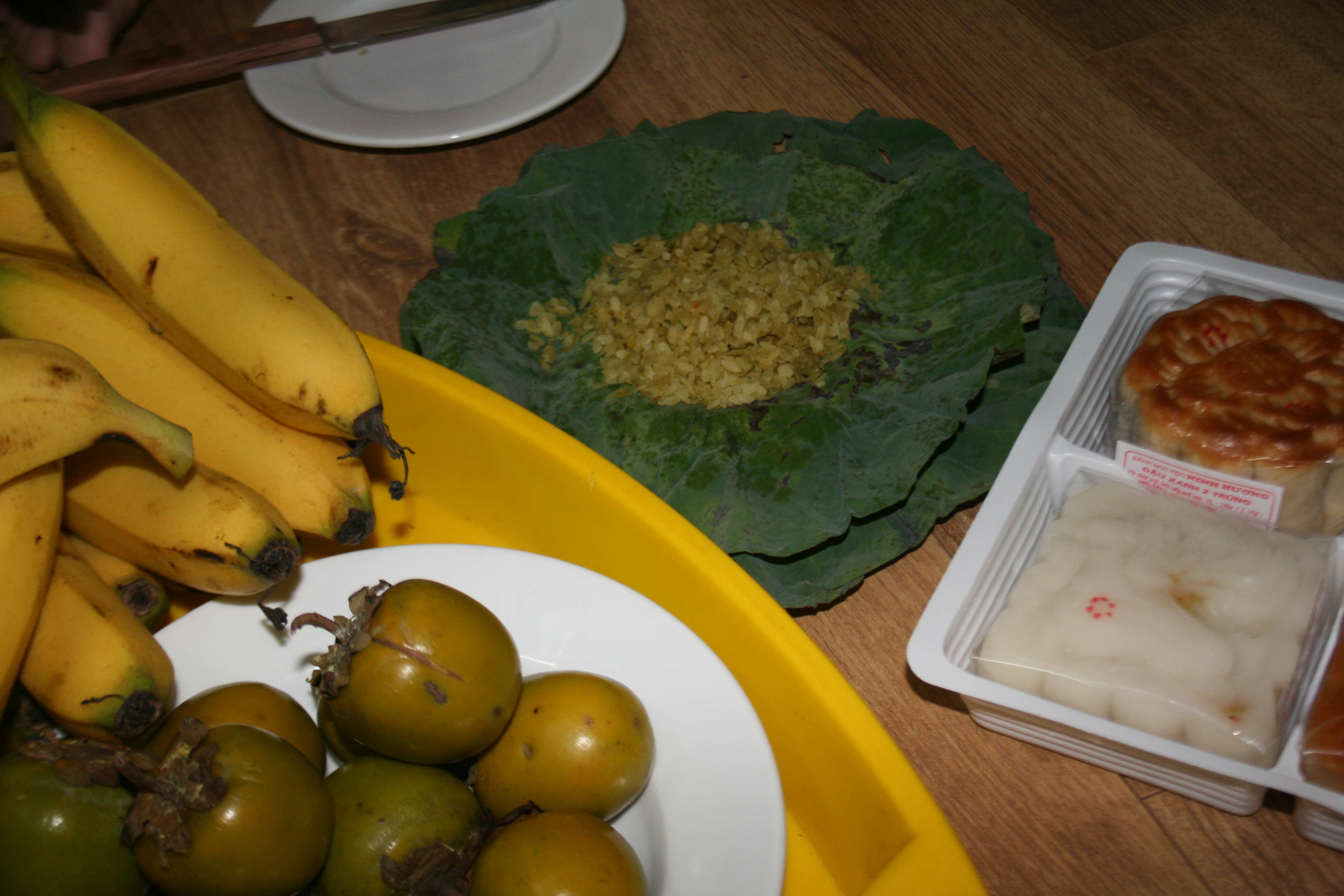 Phá cỗ trung thu trong không gian gia đình ở Hà Nội, Việt Nam với một số đồ ăn cơ bản: chuối tiêu chín ăn với cốm Vòng; bánh nướng bánh dẻo, quả hồng ngâm.